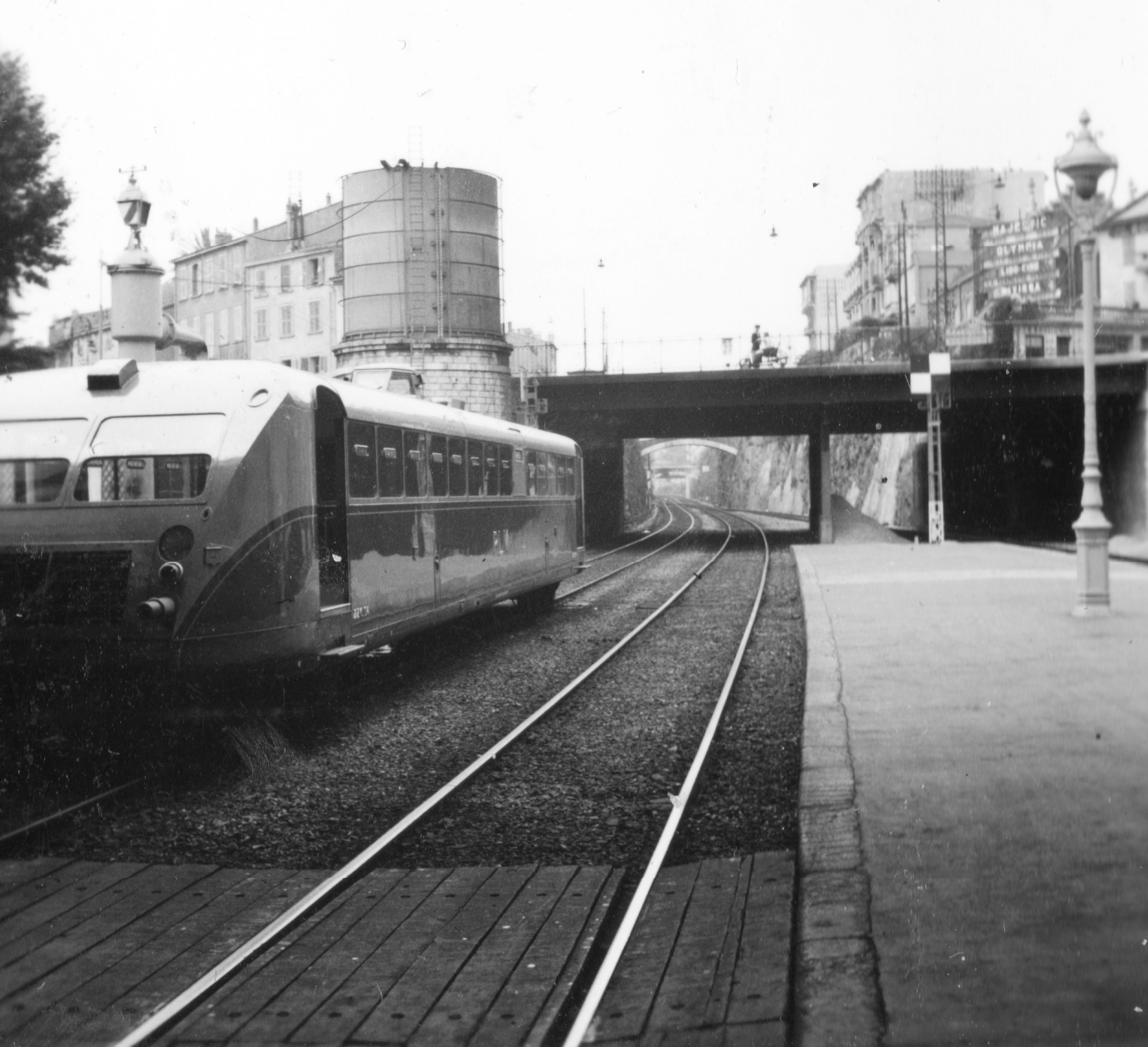 vasútállomás, a PLM (Paris-Lyon-Méditerranée) vasút szerelvénye. Location: France, Cannes Tags: railway Title: vasútállomás, a PLM (Paris-Lyon-Méditerranée) vasút szerelvénye.